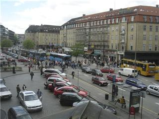 Banegårdspladsen Århus